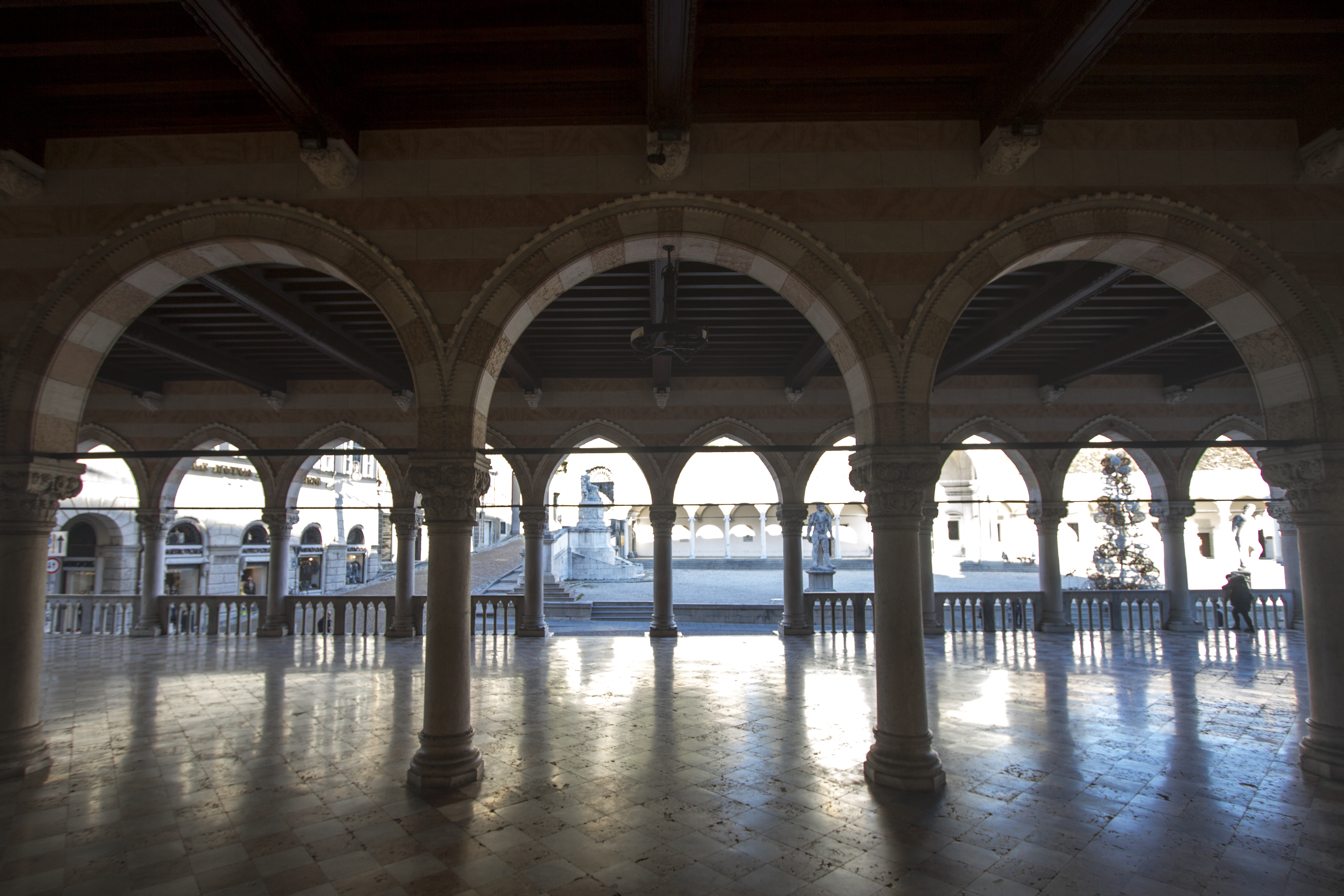 Loggia, foto scattata a Udine